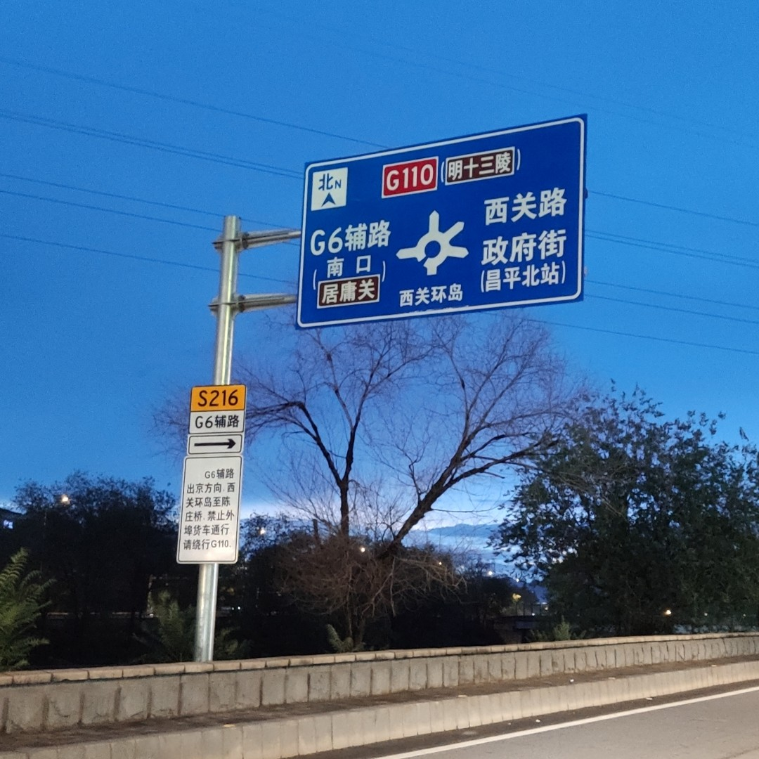 昌平西关环岛